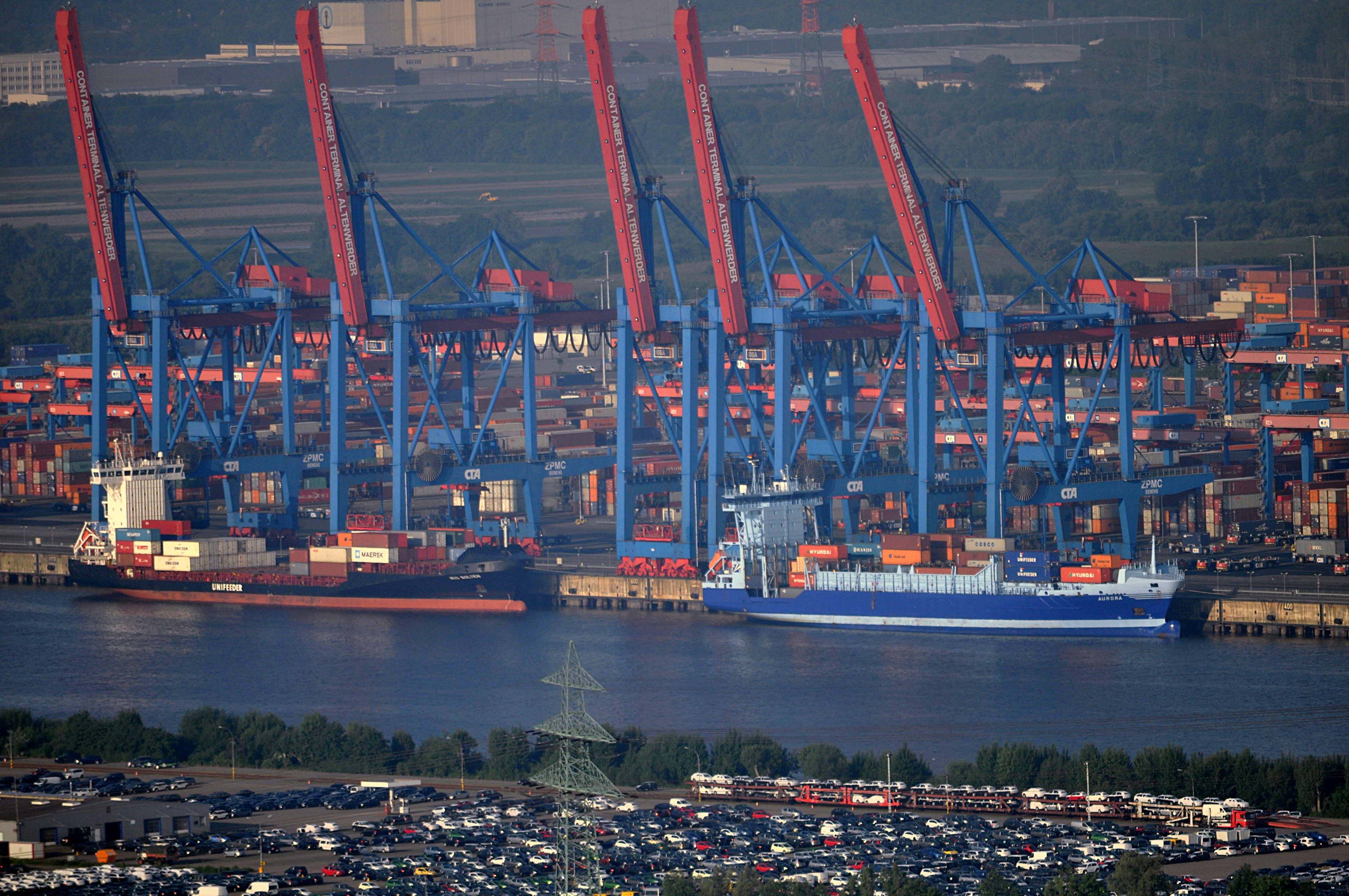 Containerterminal Altenwerder in Hamburg-Altenwerder.